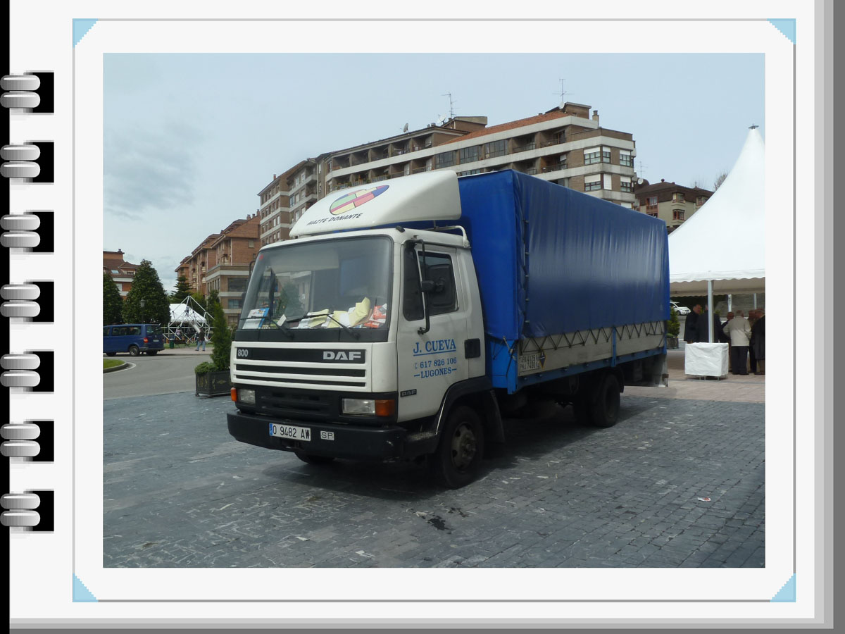 Camión